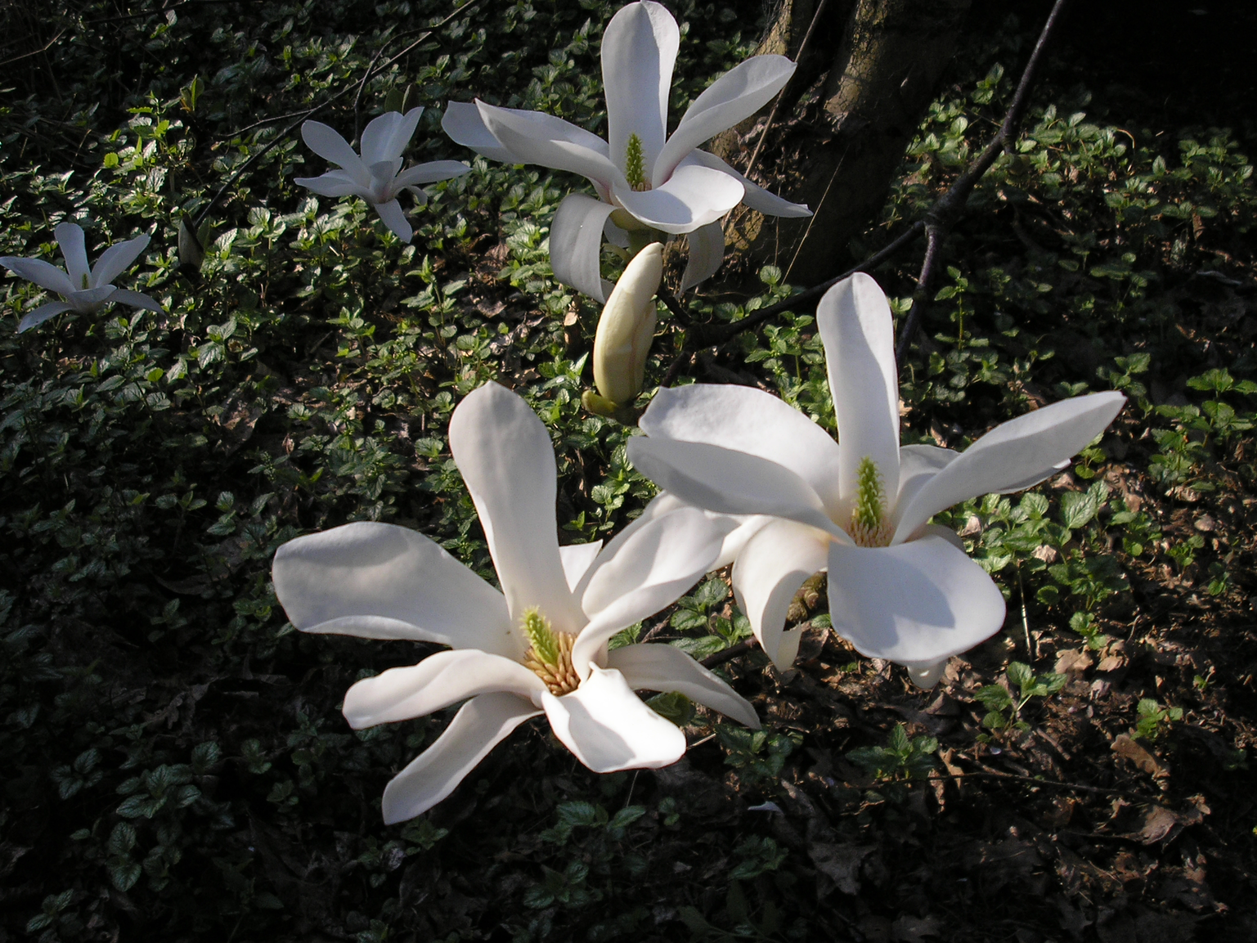 Magnolia korbus im Forstbotanischen Garten Köln.